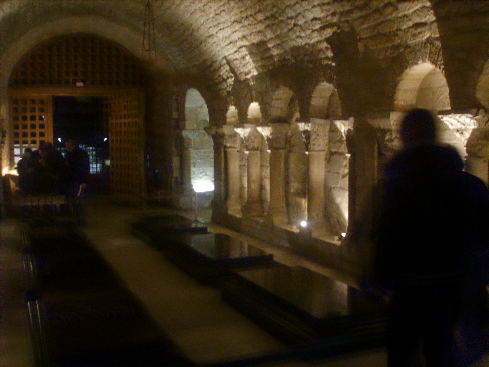 Basilica_di_saint_Denis cripta Paris